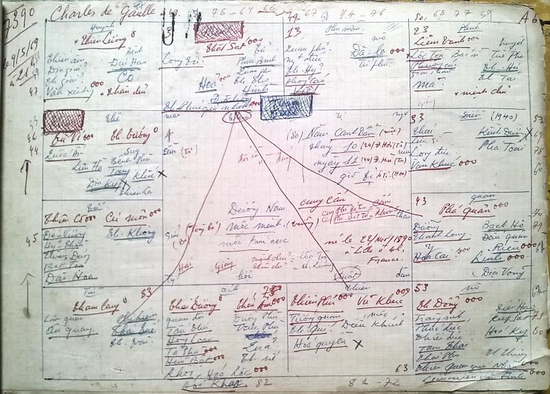 De Gaulle2